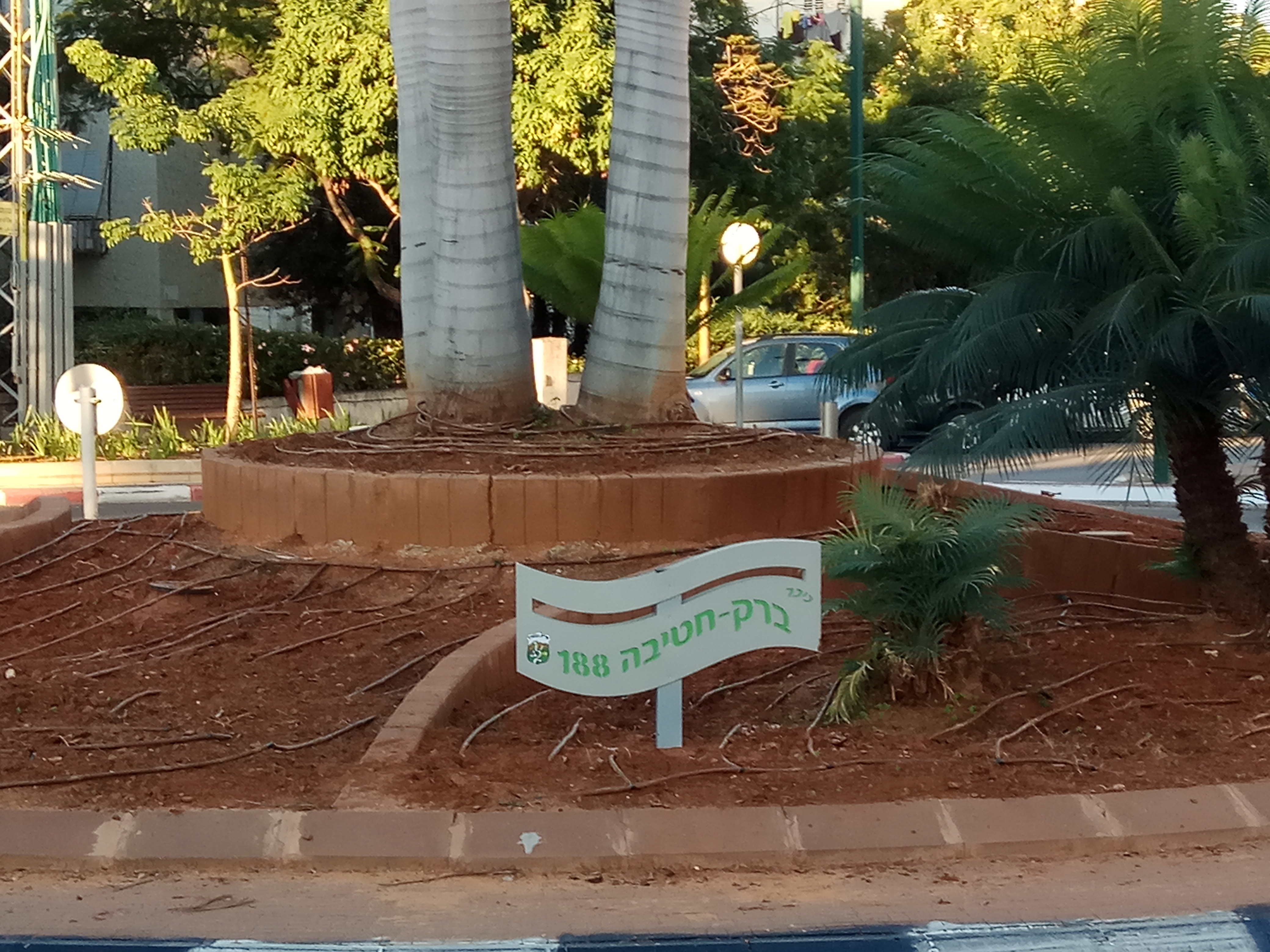 כיכר חטיבה 188 בגבעתיים